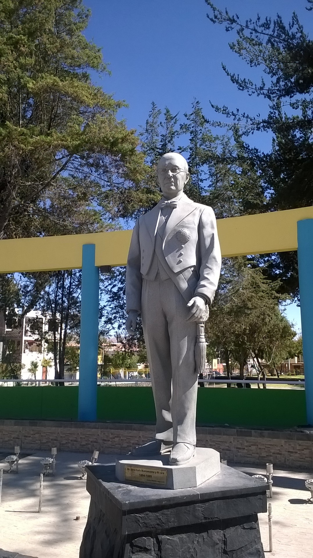 Estatua del presidente José Luis Bustamante y Rivero en el barrio de Ciudad Satélite, ubicado en el distrito epónimo.